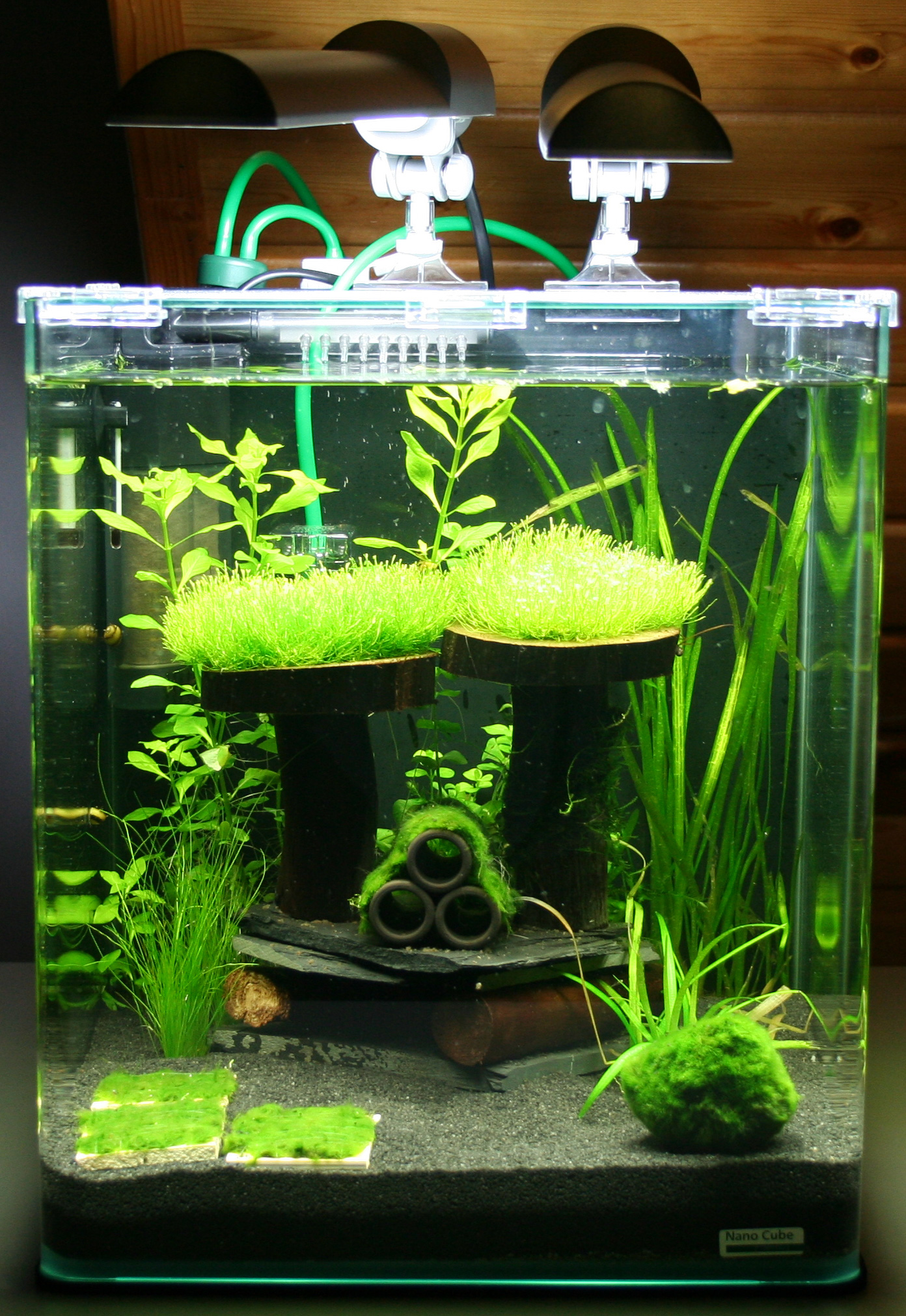 Einfaches Nano-Aquarium mit zwei Lampen, Aquariumfilter, "BIO CO2"-Anlage, Dekoration und Bepflanzung.